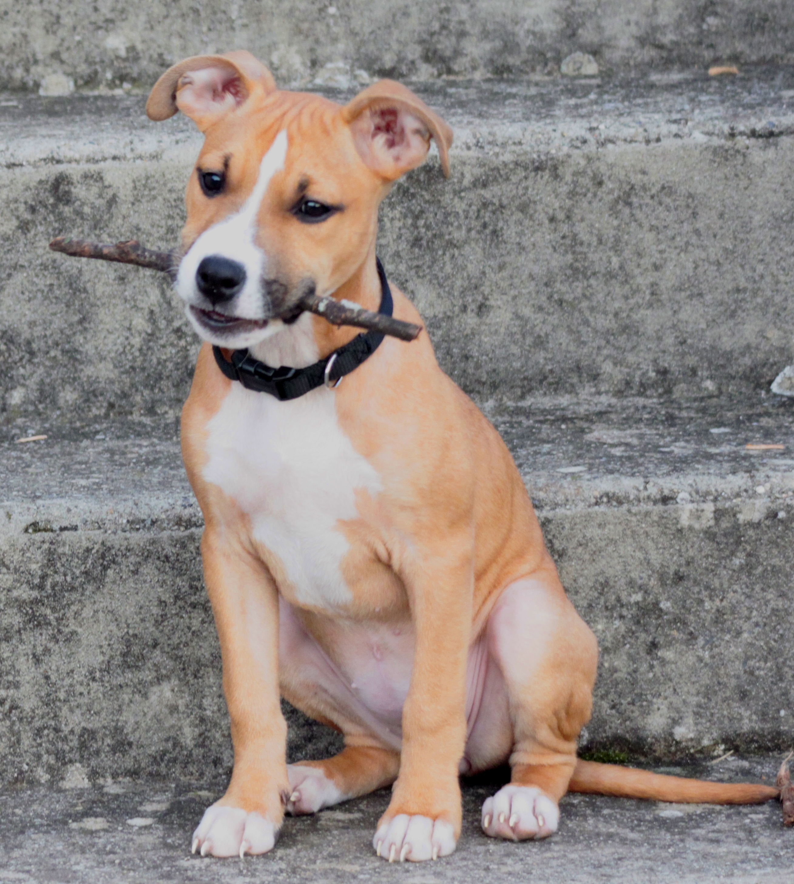 4 Mois femelle Amstaff (Cristal Hearts)